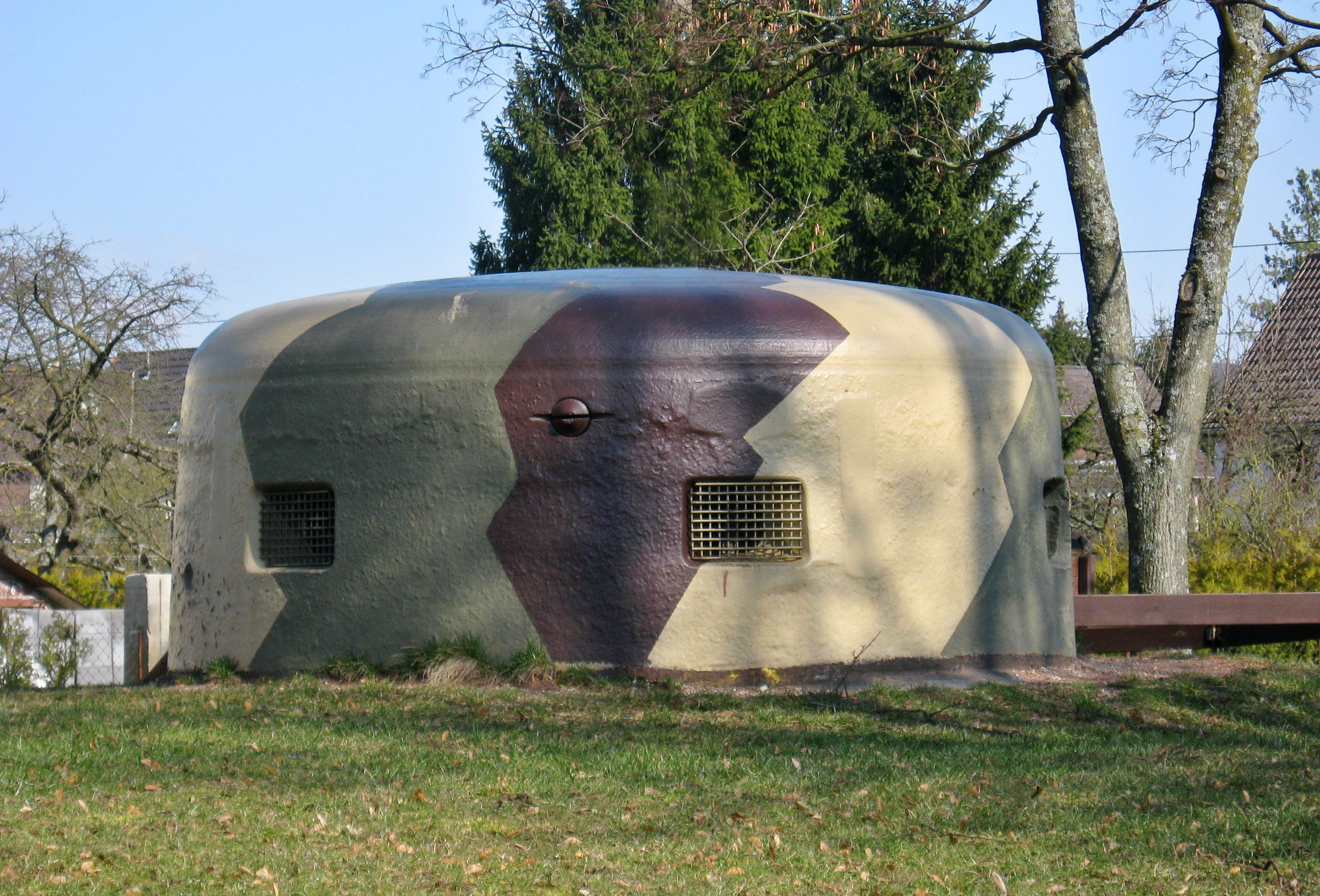 Kuppel des Westwallbunker ins Dillingen (Saar)